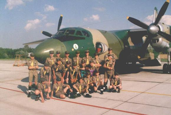 Wizyta Drużyn, wchodzących w skład Szczepu 19 KDL ZHR na lotnisku w Balicach (w 13 Eskadrze Lotnictwa Transportowego), 2001 rok.